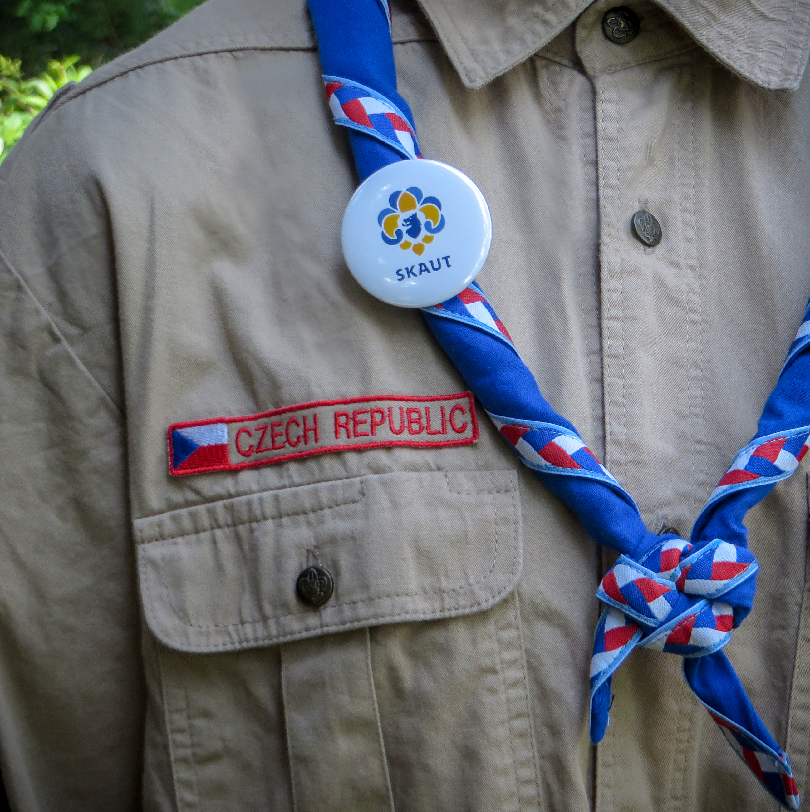 Základem skautského kroje je krojová košile, základním doplňkem krojové košile je šátek. Na fotografii vidíte šátek národní. Je založený na národních barvách, inspirován šátky českých kontingentů na mezinárodní akce a šátkem ke 100 letům českého skautingu.